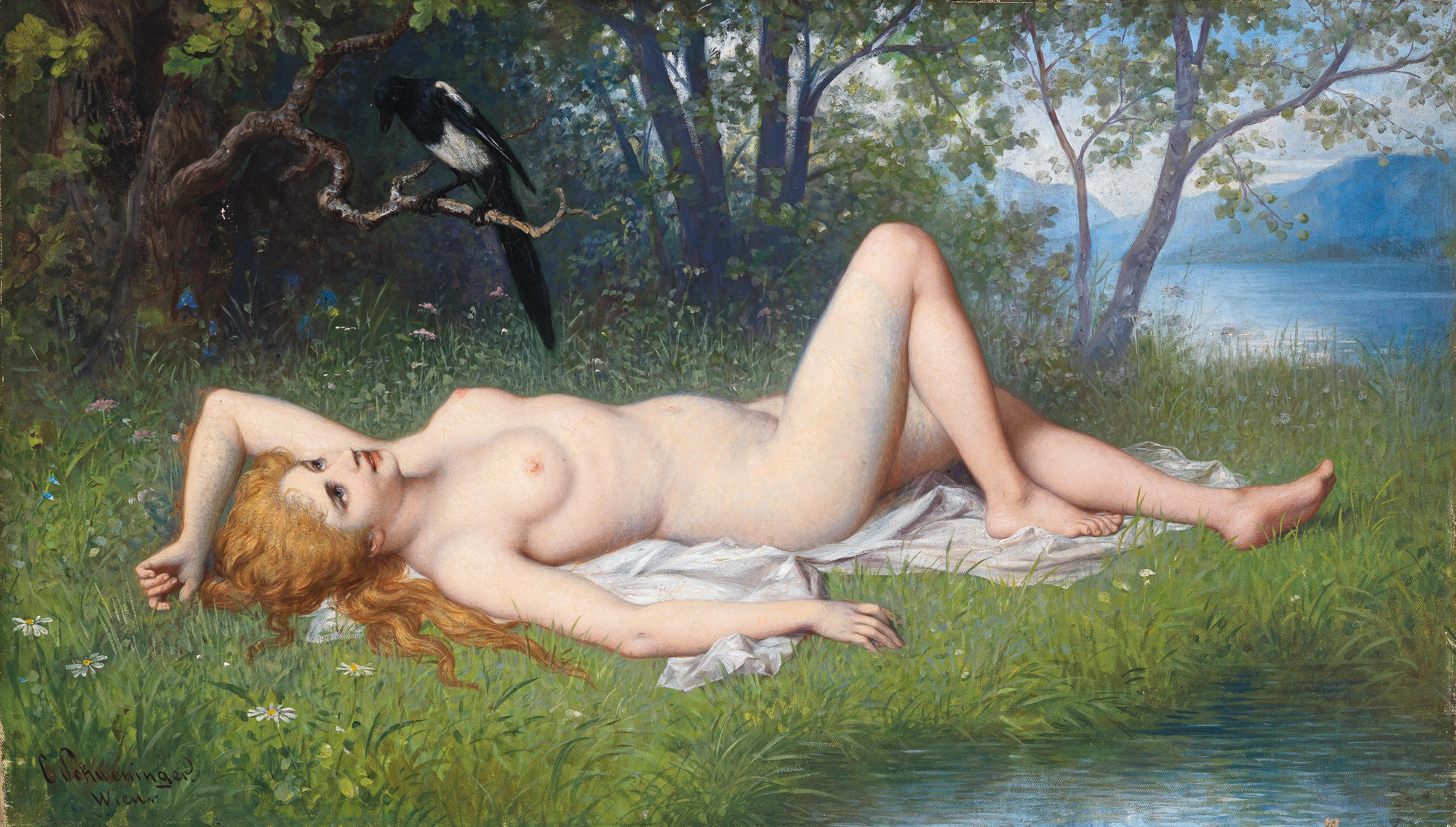 Die Elster, signiert, bezeichnet C. Schweninger Wien, Öl auf Leinwand, 42 x 72,5 cm